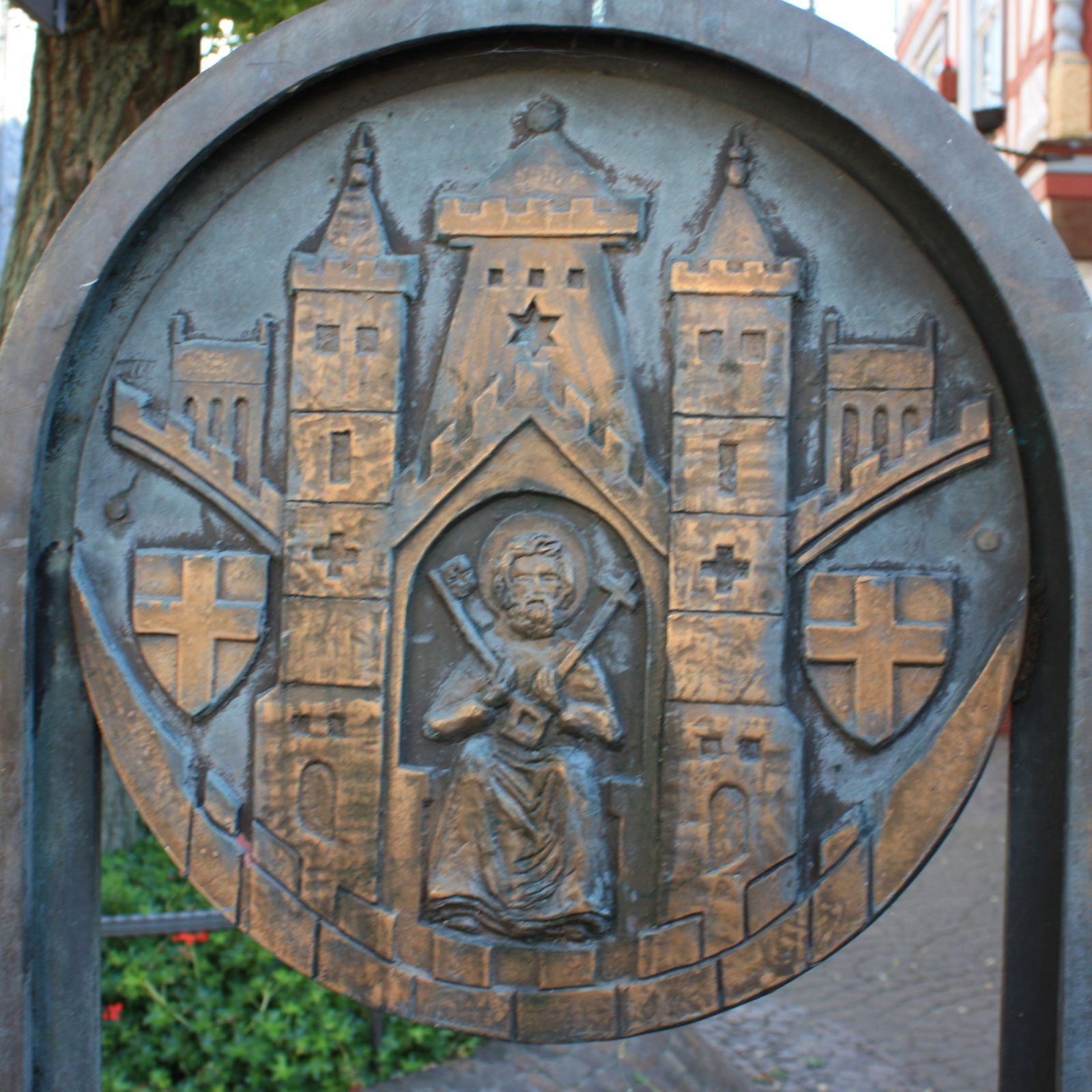 Der Nachdruck des ersten Stadtwappen von Montabaur, Rheinland-Pfalz wurde in der Fußgängerzone aufgestellt